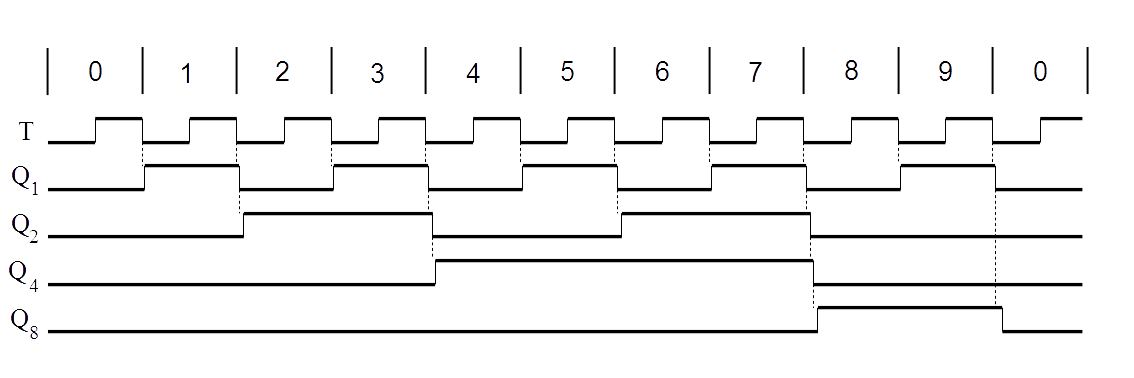 Signal-Zeit-Diagramm zu Dezimalteiler